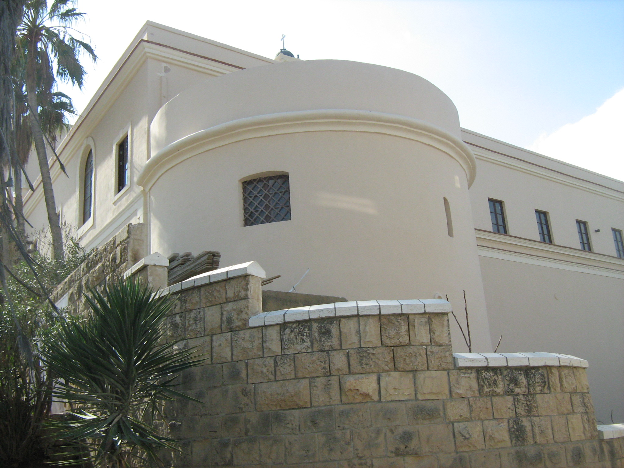 כנסיית פטרוס הקדוש ביפו